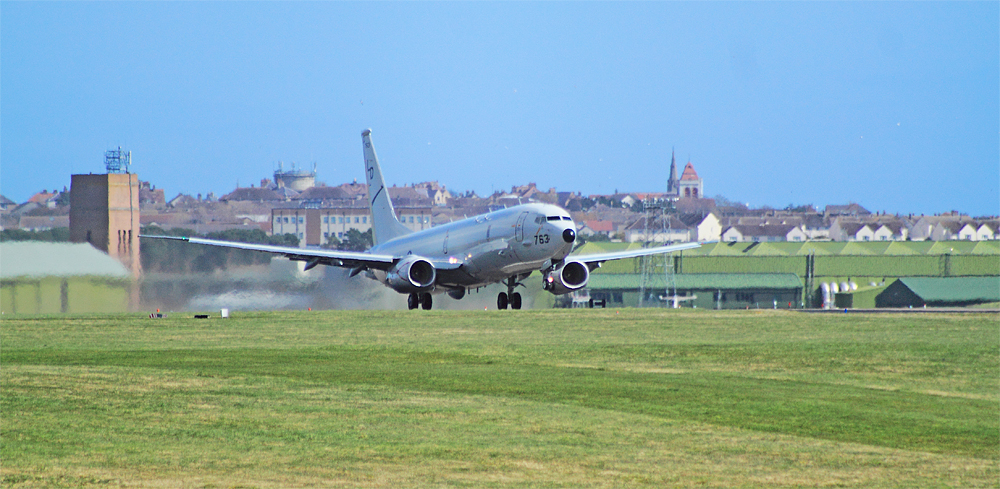 Boeing P-8A Poseidon 168763